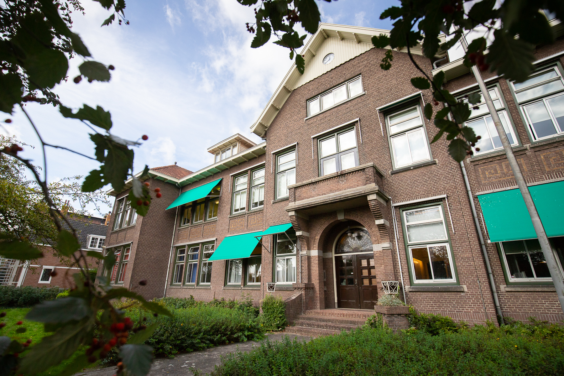 Voorkant van de school gezien vanuit de tuin. Dit is het oudste gedeelte van de school en komt uit 1927. Het gedeelte is nog grotendeels in zijn oorspronkelijke staat.